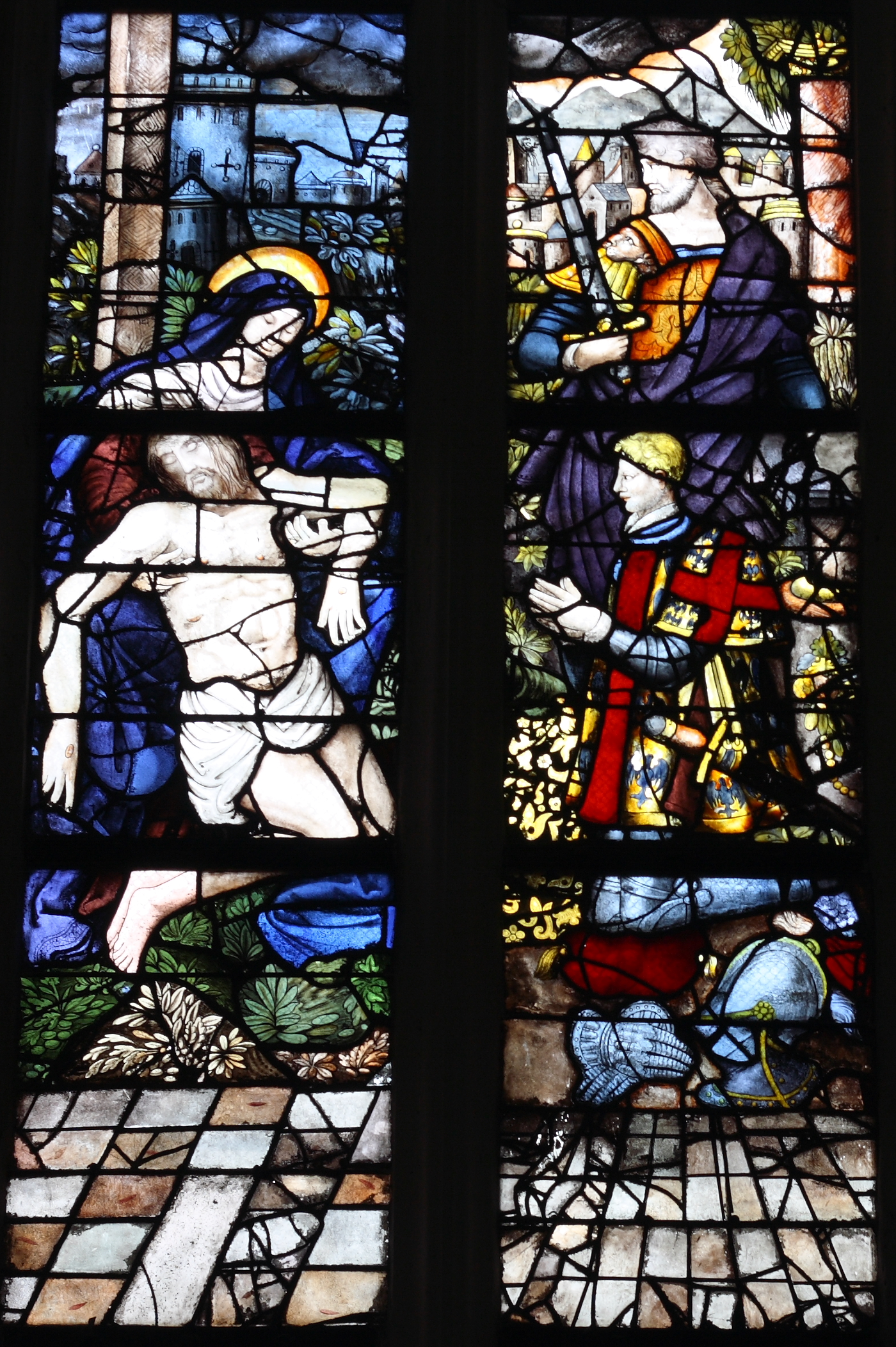 Ausschnitt des Bleiglasfensters Nr. 6 in der katholischen Pfarrkirche Saint-Acceul in Écouen (siehe Mathieu Lours: Saint-Acceul d'Écouen. Une cage de verre en pays de France, éditée par l’Association Les Amis de Saint-Acceul)